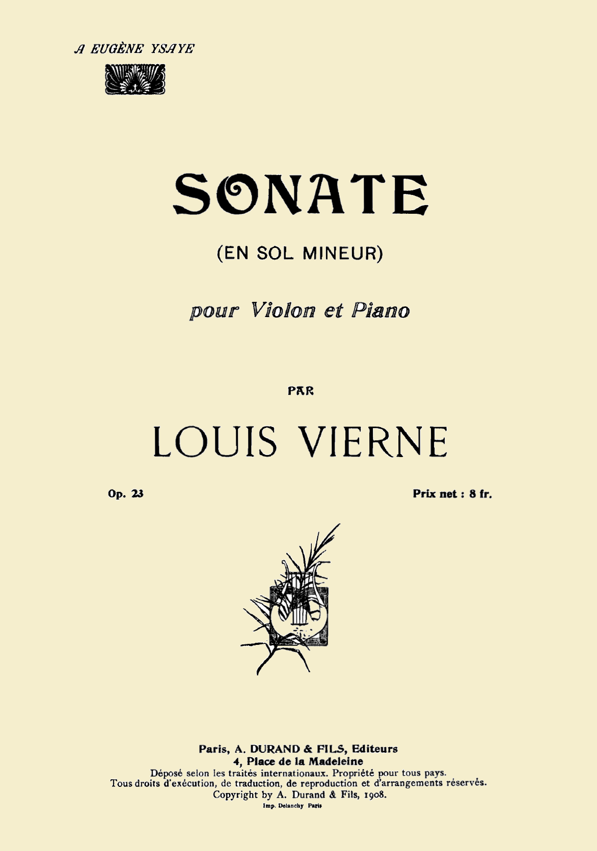 Louis Vierne, Sonate pour violon et piano, op.23 - couverture de la partition originale (1907)